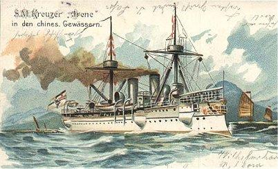 S.M.S. Irene